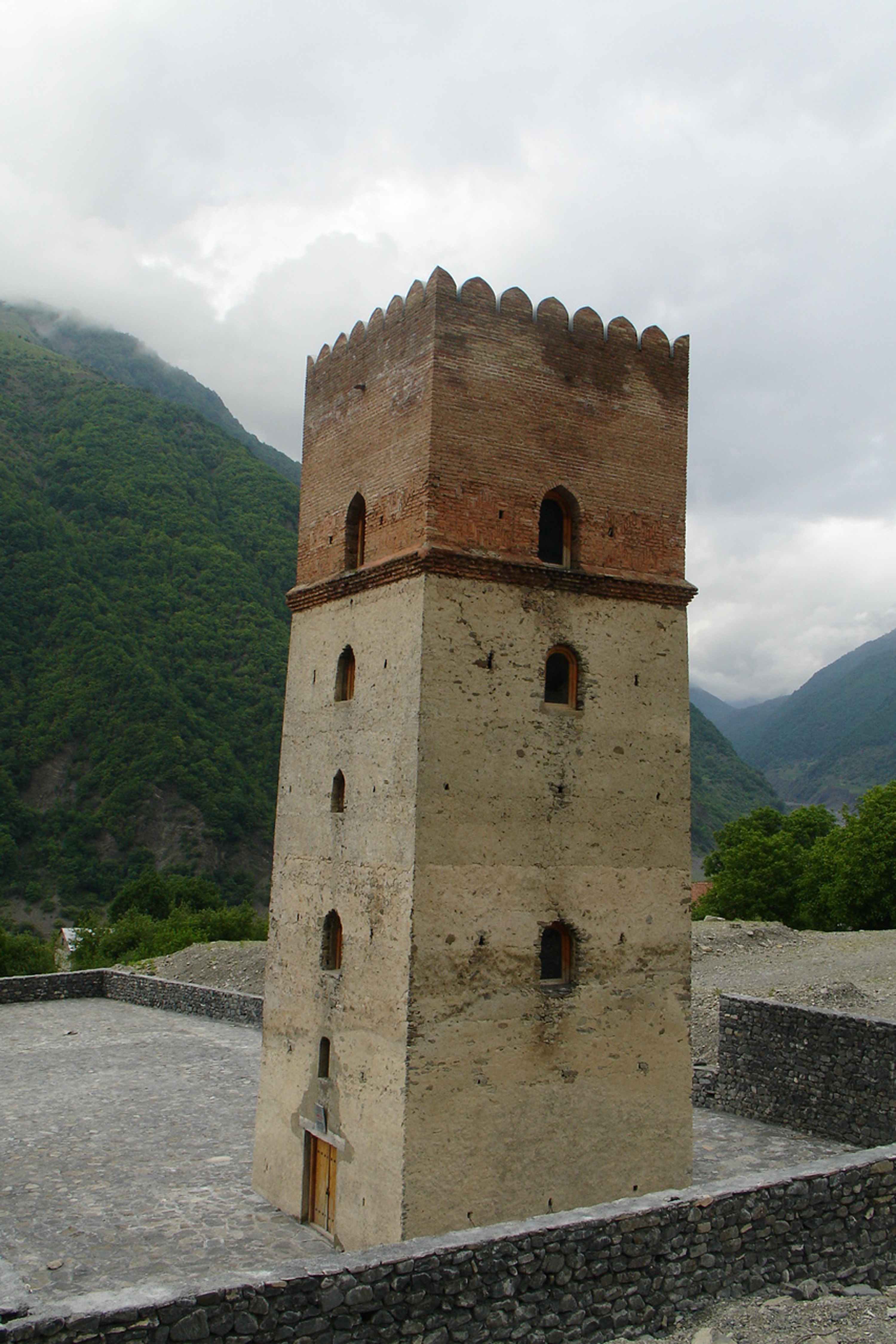 Sumuq Qala